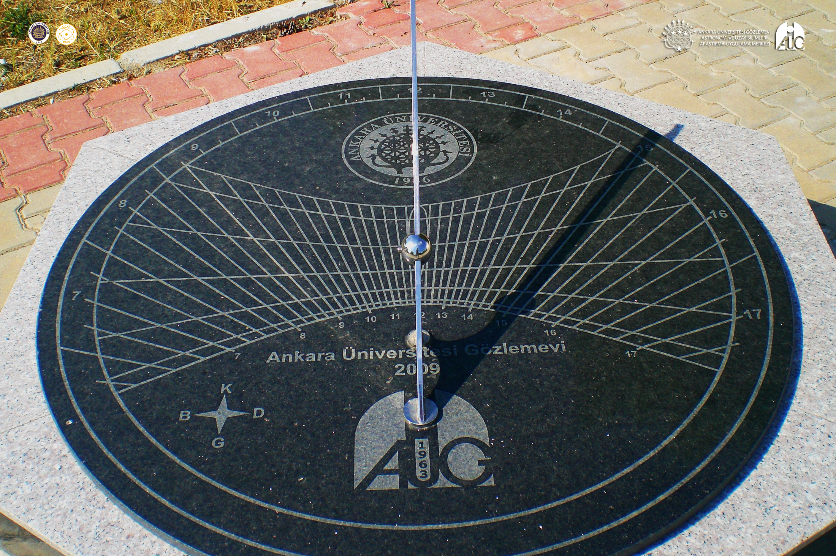 Güneş Saati